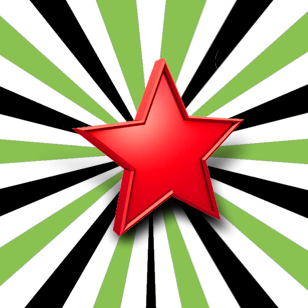 شعار سيريان فيلمز المعتمد